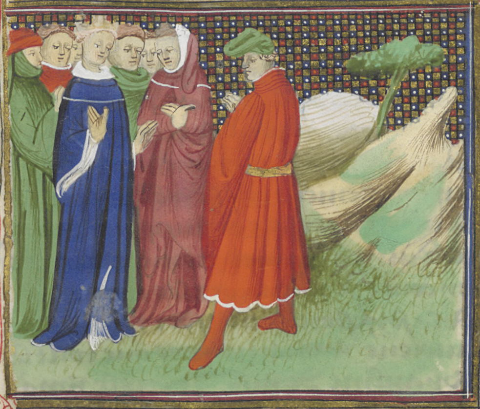 Edouard III et Robert III d'Artois